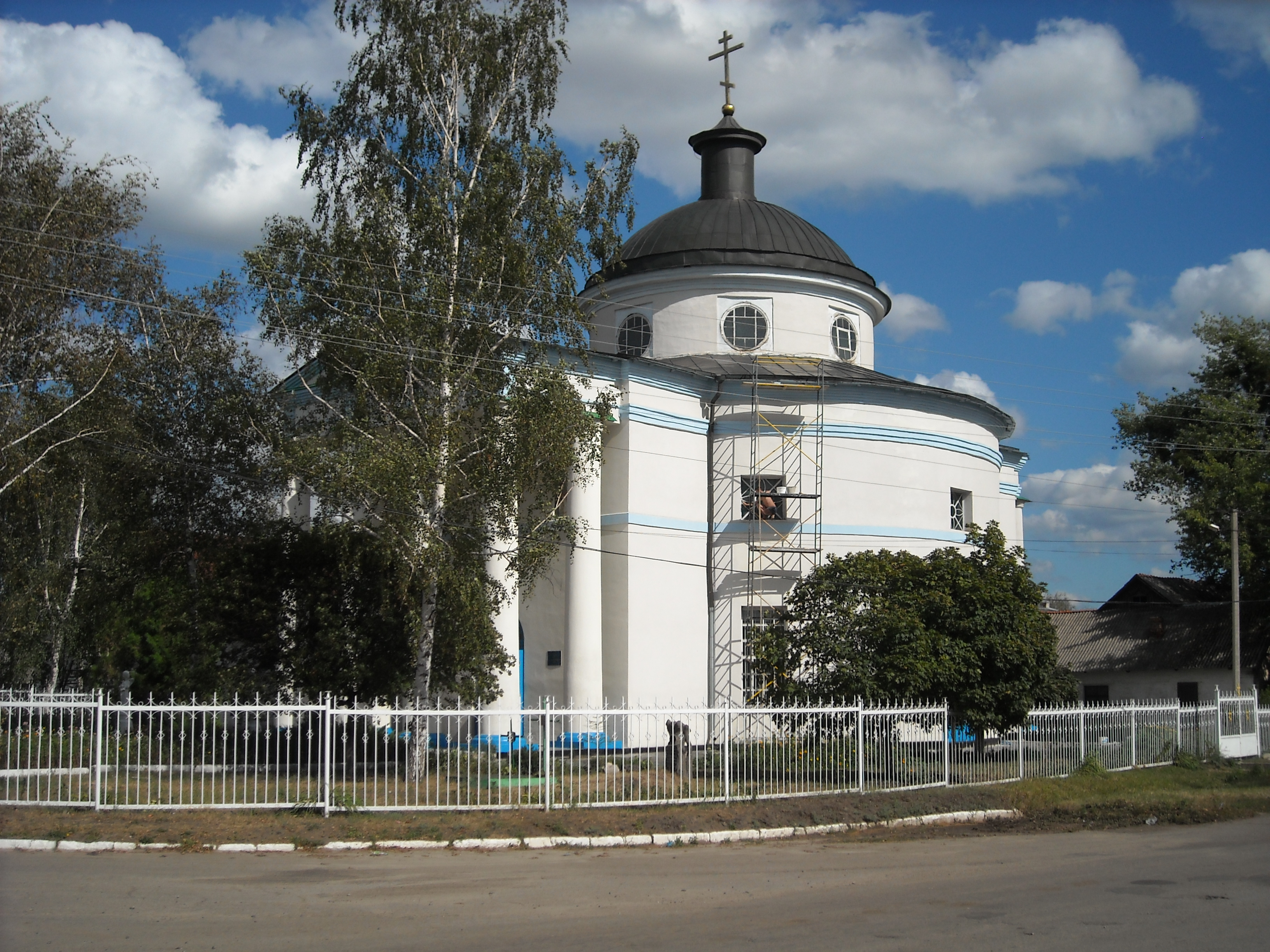 Україна. Харківська область. Нововодолазький район. Село Рокитне. Архангело-Михайлівський храм.